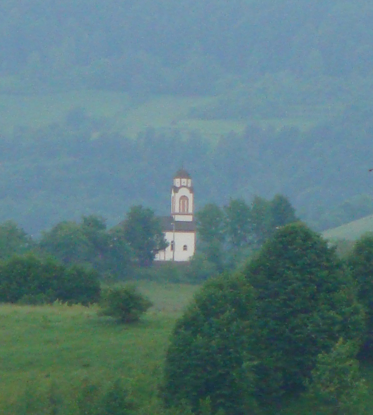 Храм_Свете_Петке_(Пљева,_Шипово)